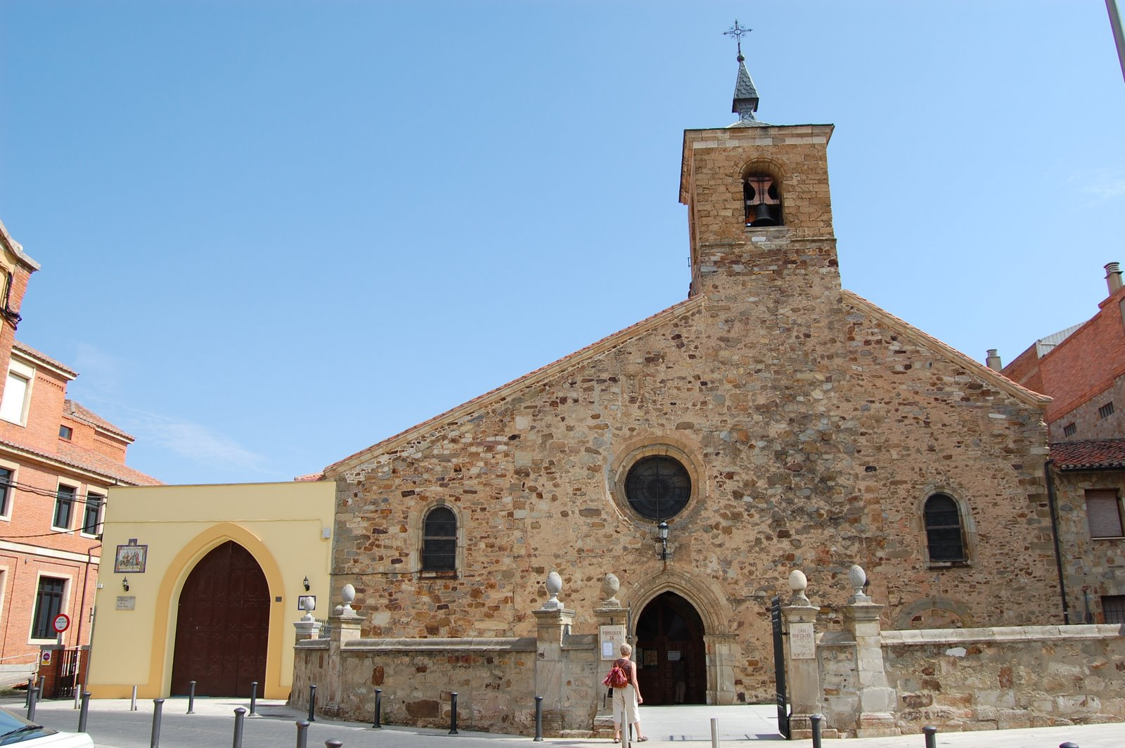 Iglesia de San Bartolomé (Astorga, León, España).